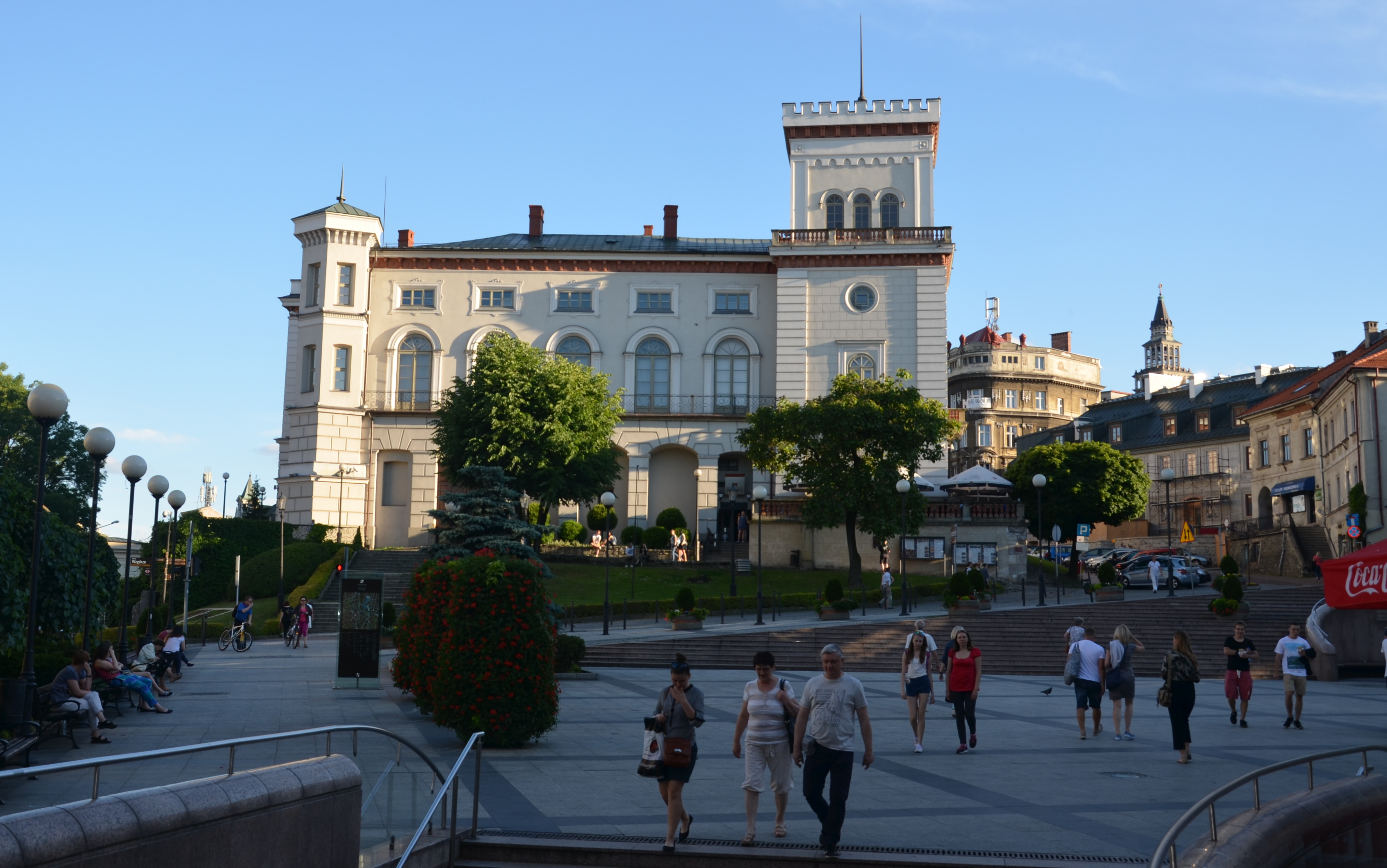 Das Schloss der Fürsten Sulkowski, Töpferplatz, und Stadtberg zu Bielitz